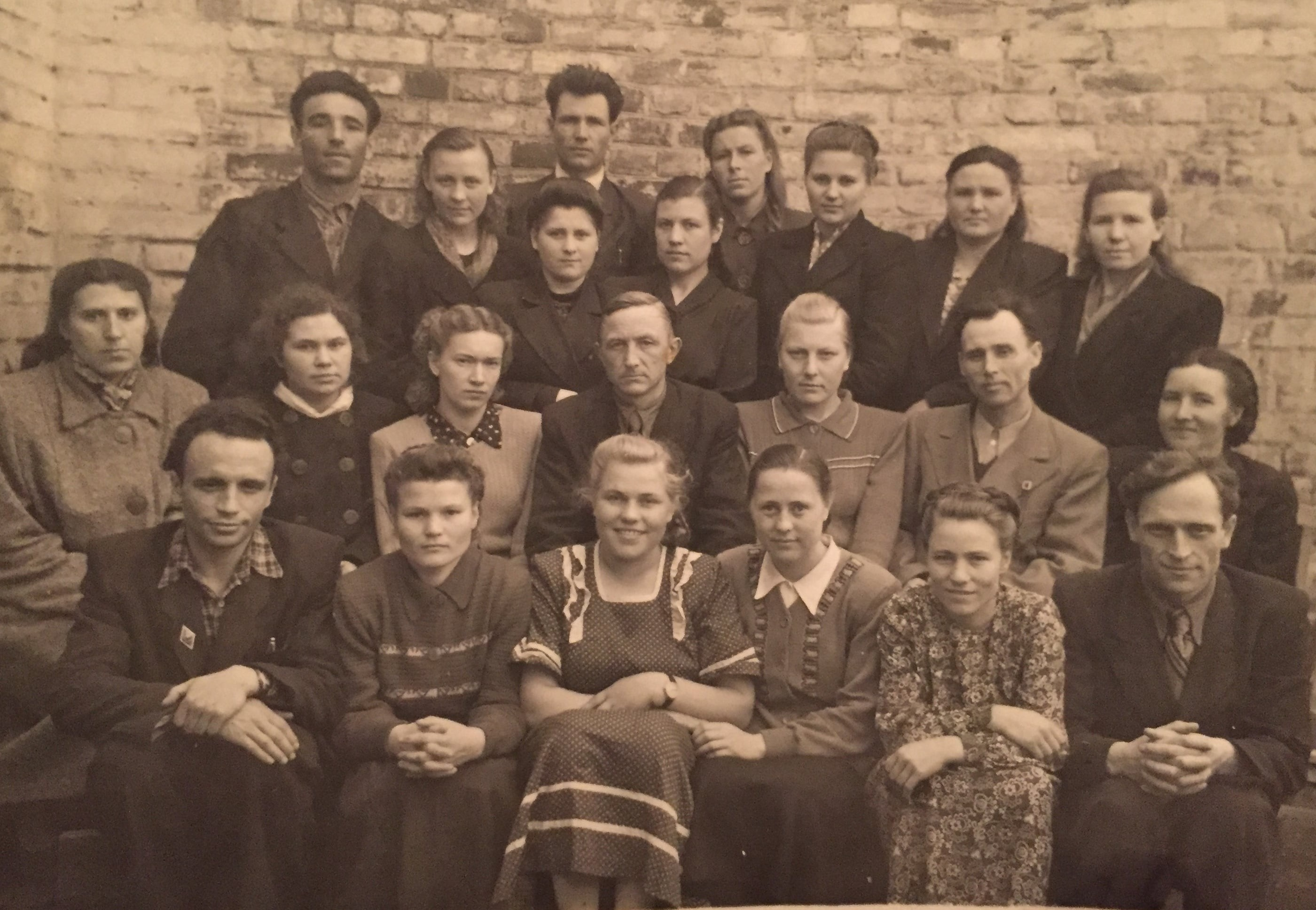 Учителя Верхнеярославской СОШ, 1947 год